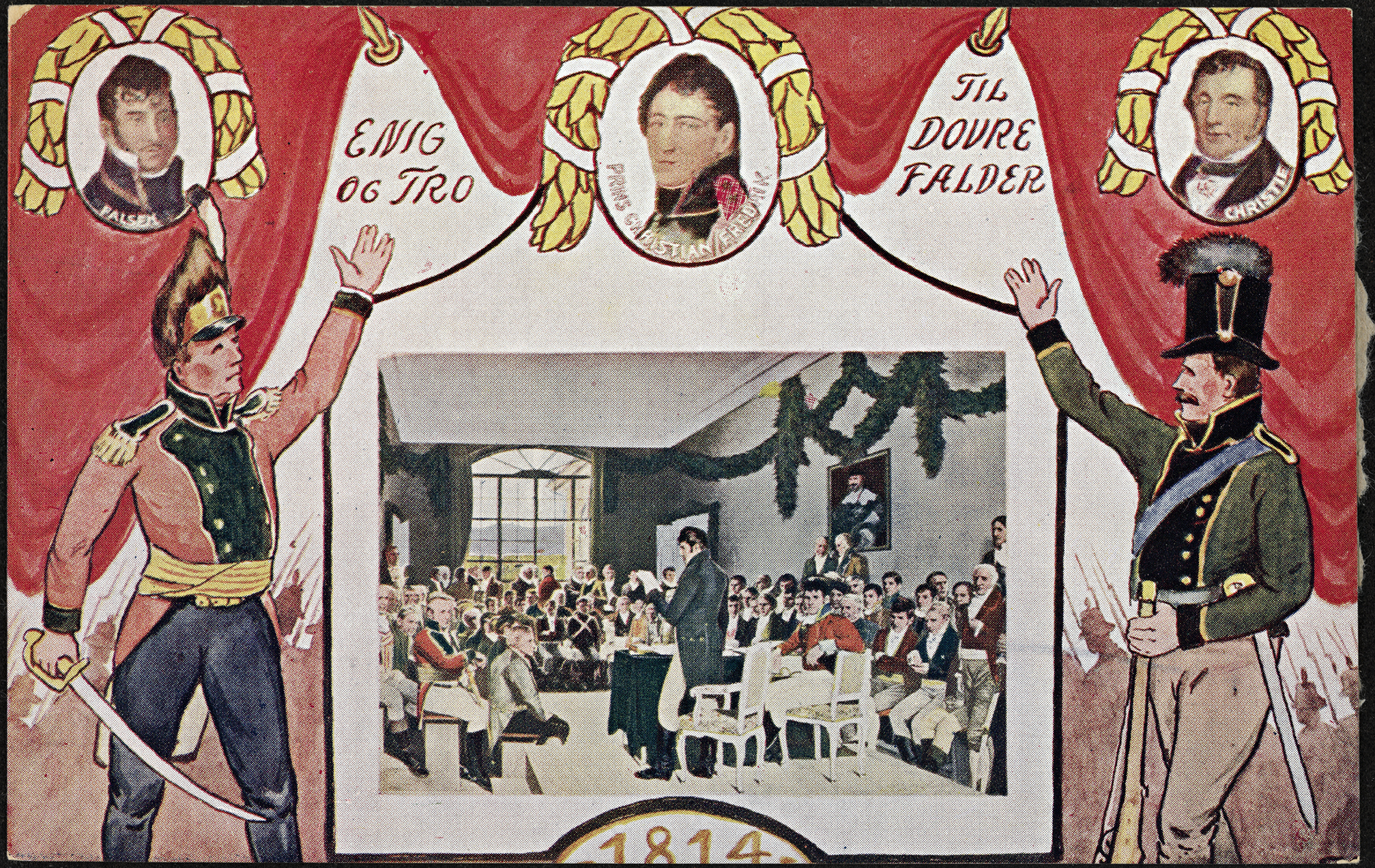 Tittel / Title: Enig og Tro til Dovre falder 1814 Beskrivelse / Description: Postkort. Gjengivelse av maleriet "Eidsvold 1814" av Oscar Wergeland (1844-1910) Kunstner / Artist: ukjent / unknown Utgiver / Publisher: C. A. Erichsen (Christiania) Utgitt / Published: 1914 Sted / Place: Akershus, Eidsvoll Eier / Owner Institution: Nasjonalbiblioteket / National Library of Norway Lenke / Link: Bildesignatur / Image Number: blds_05721